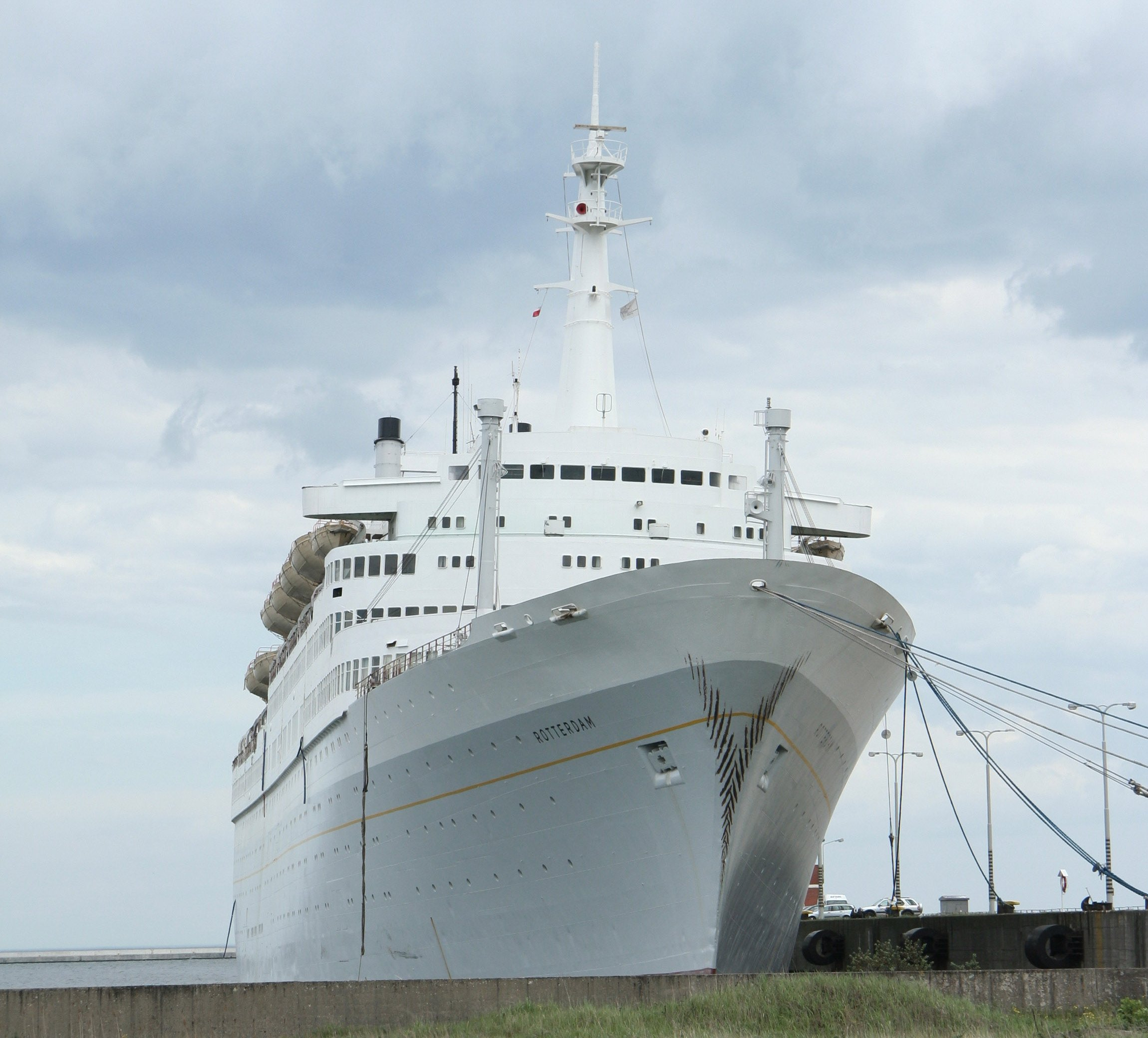 SS Rotterdam in Gdańsk, Poland